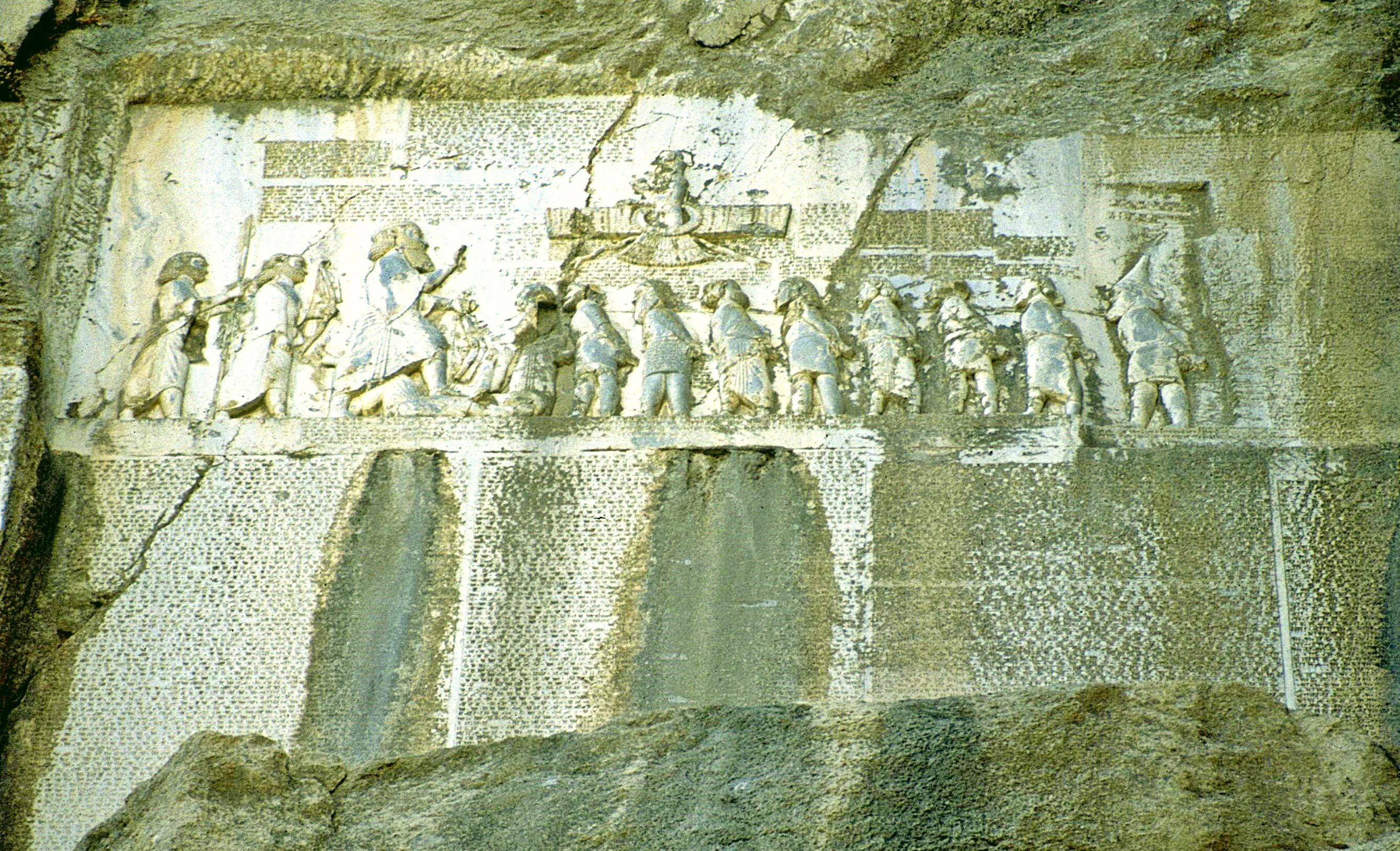 Dareios-Relief